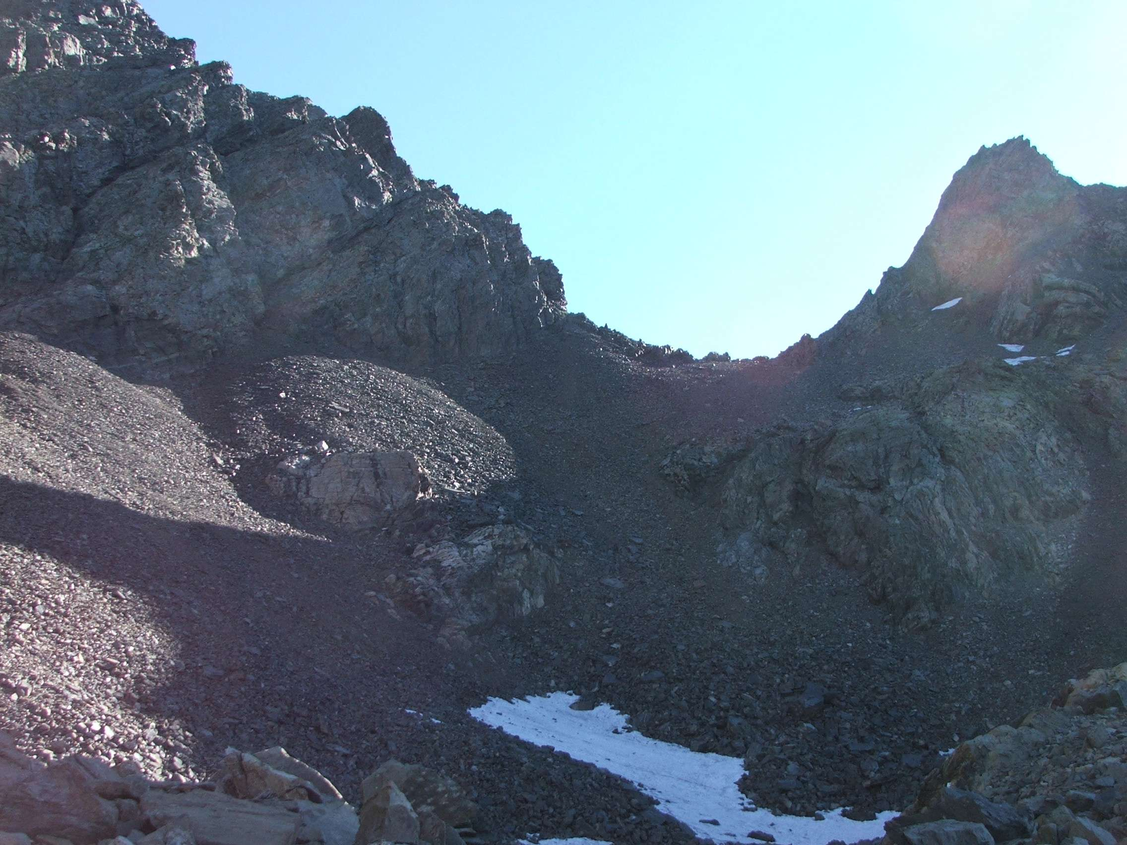 fatta da me - nessun copyright Licensing Categoria:Immagini esclusivamente in GNU FDL